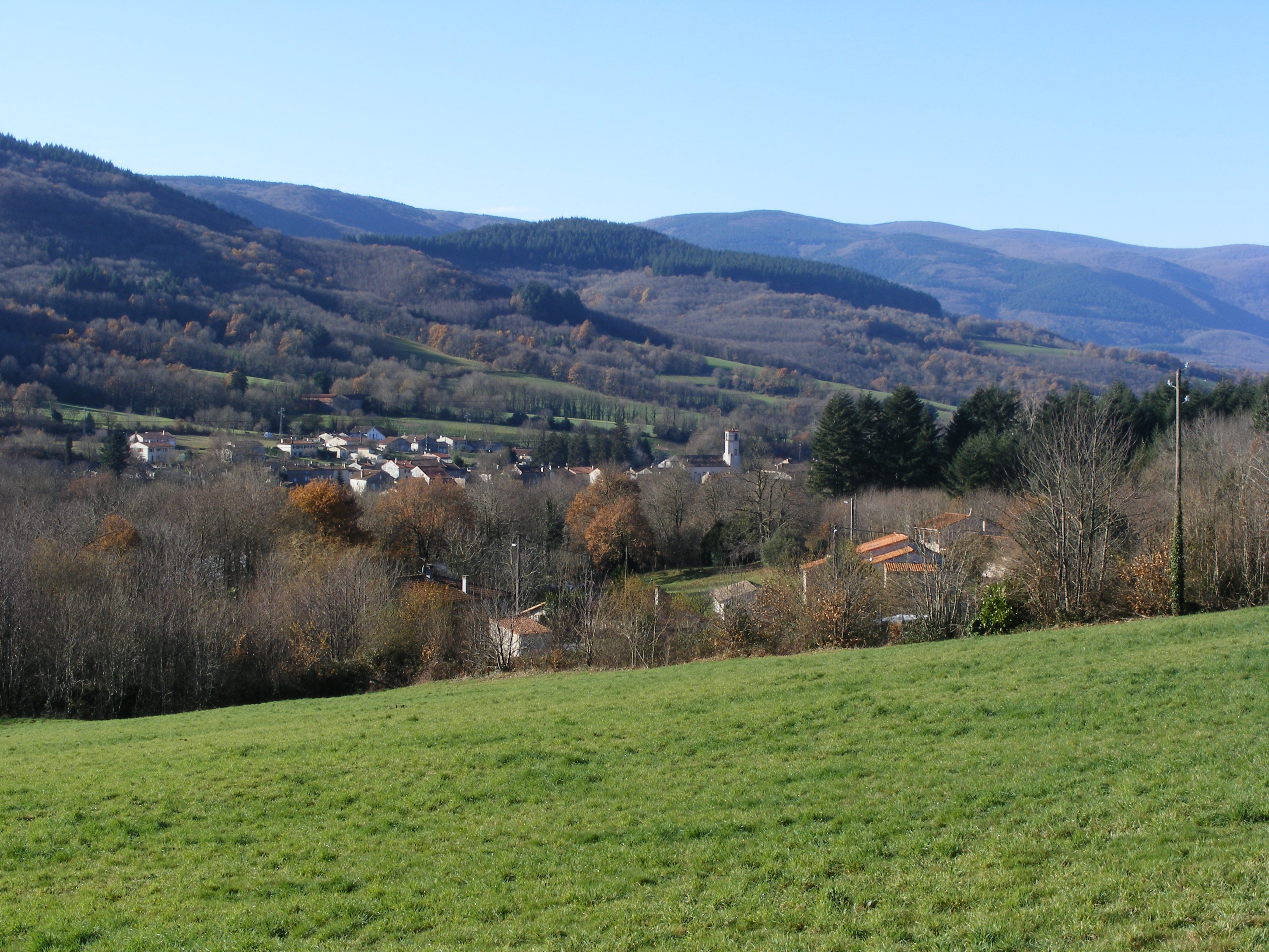 Lacabarède